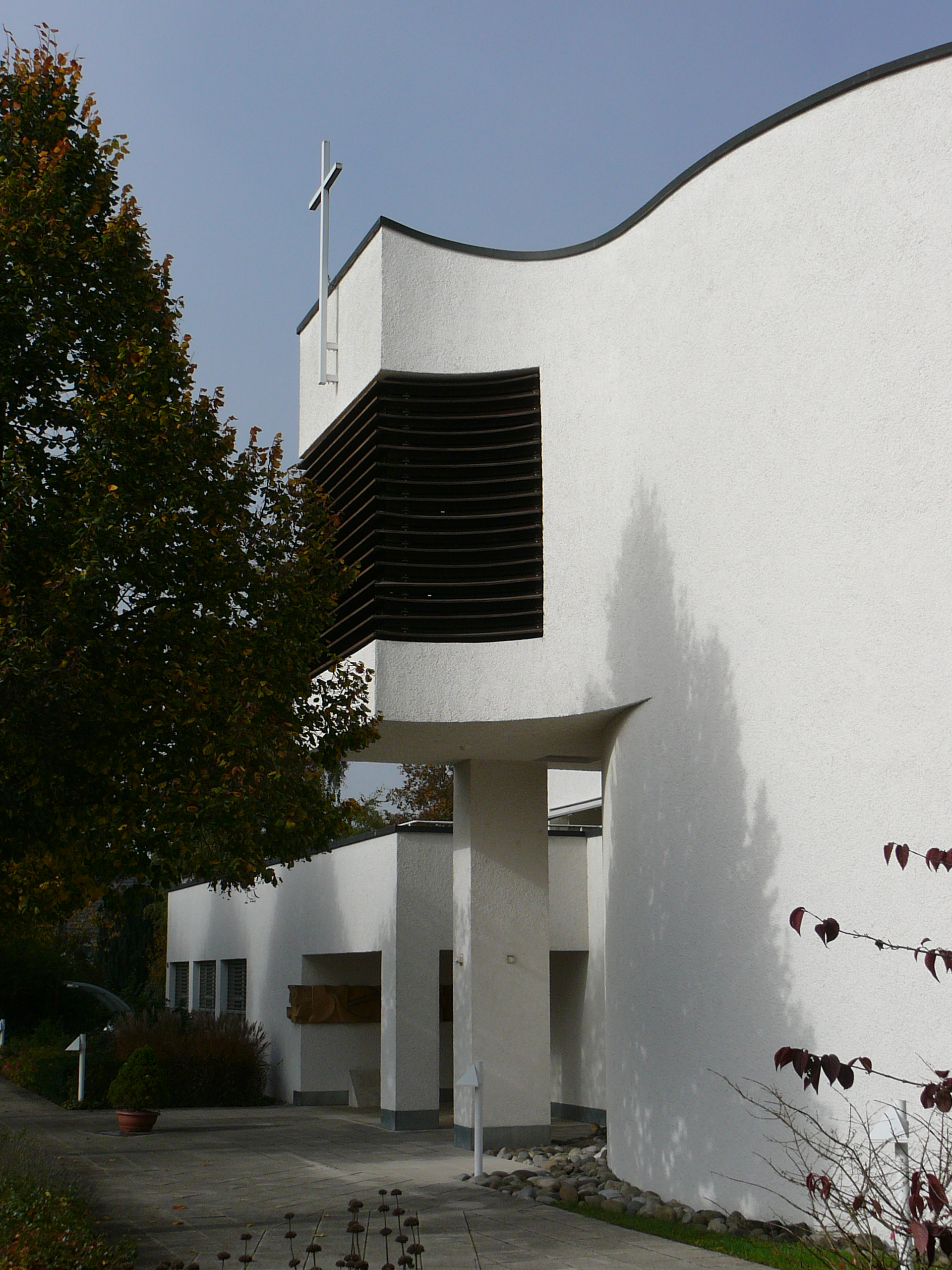 Römisch-katholische Auferstehungskirche St. Maria Magdalena Rafz, Kirchturm